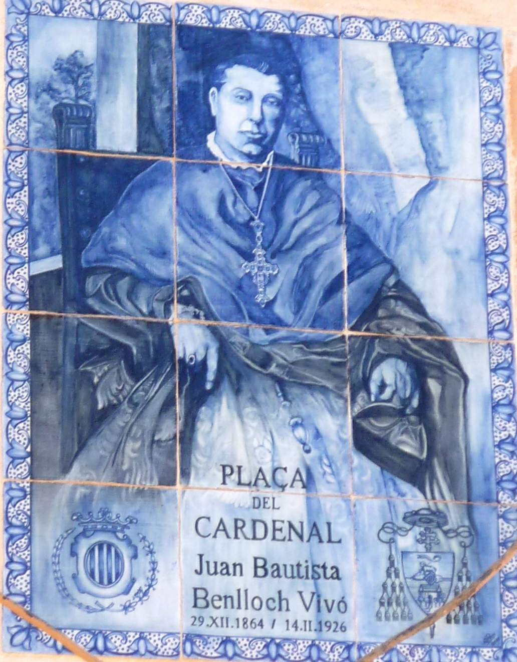 Iglesia de la Mare de Déu dels Socors (Benetússer, Valencia)